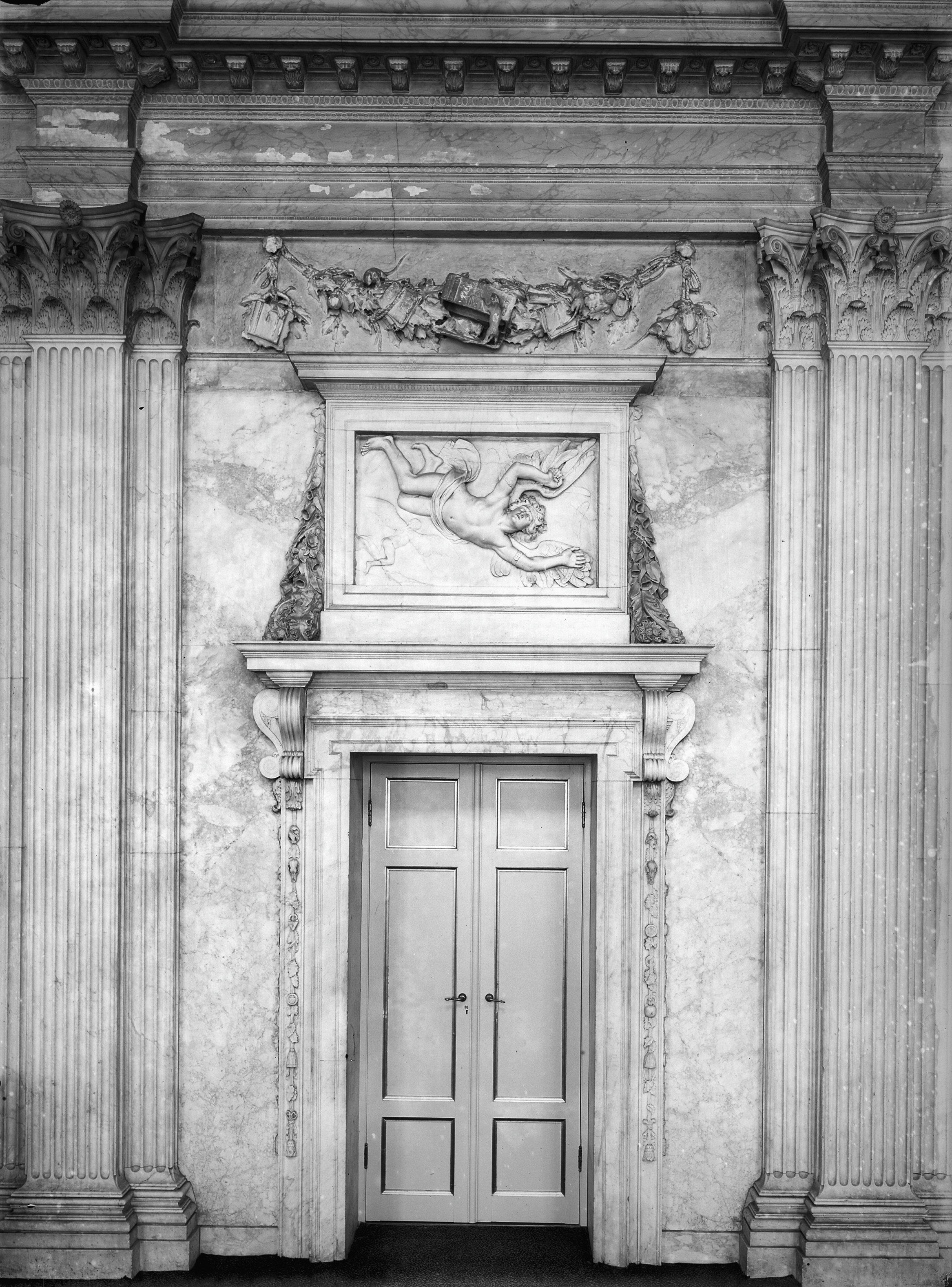 Koninklijk Paleis: Interieur, ingangspartij, met bovendeurstuk, van de Desolate Boedelkamer